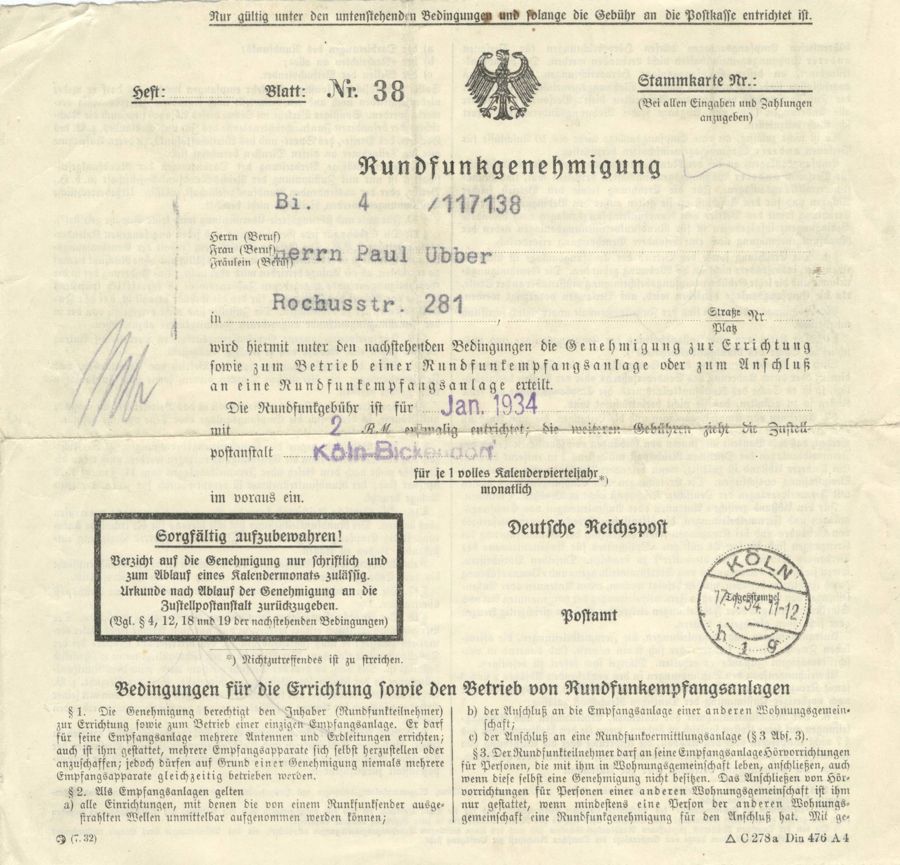 Rundfunkgenehmigung Köln 1934 Verschickt von der Reichspost an Paul Ubber in Köln.